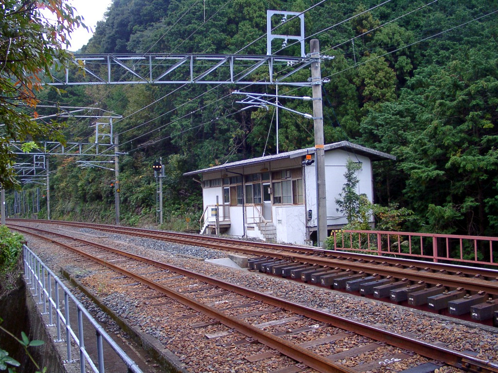 双子山信号場の施設付近の複線箇所(敷地外から撮影)